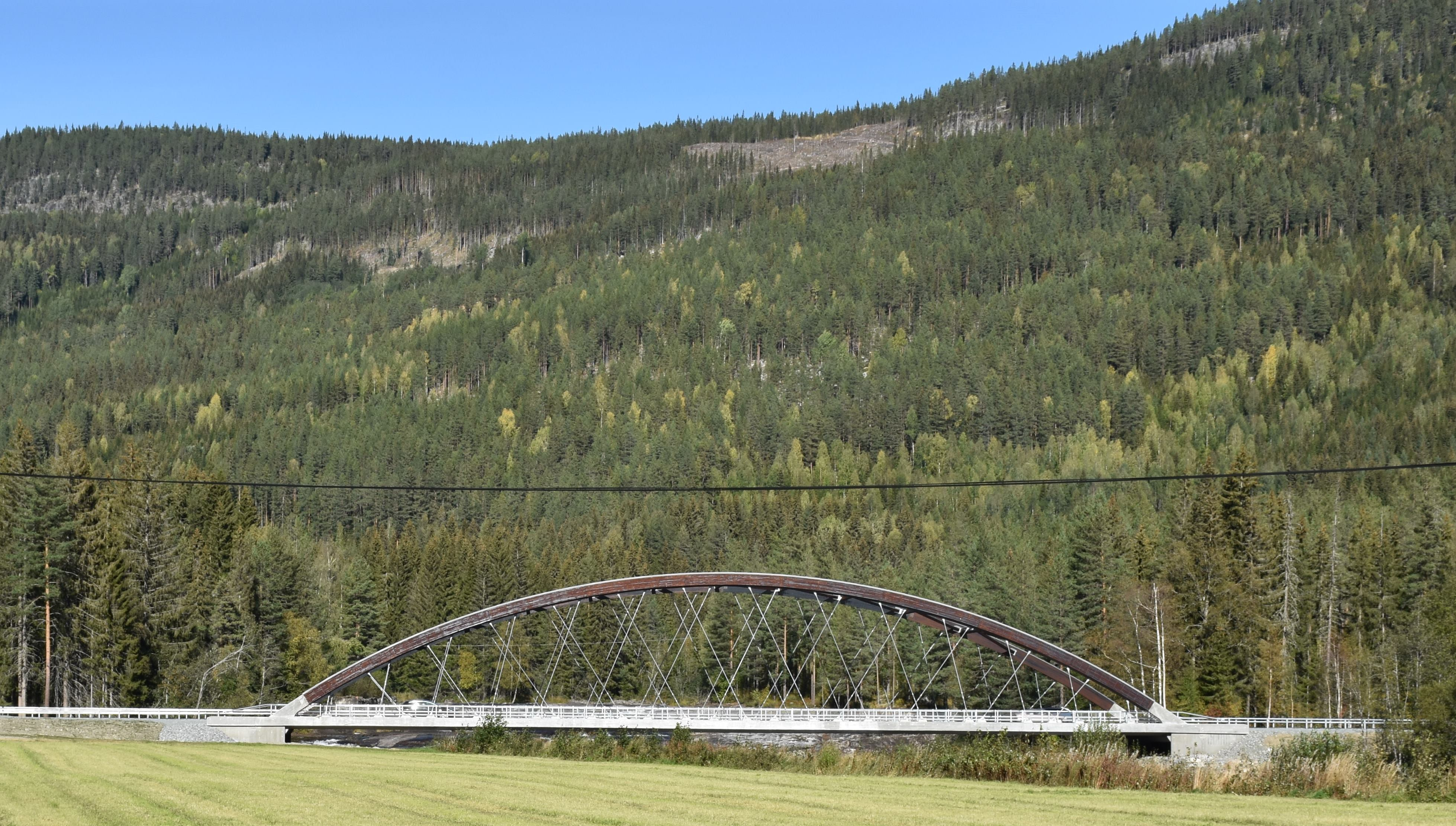 Hellefossen bru fører fylkesvei 251 over Etna og avlaster Lunde bru.